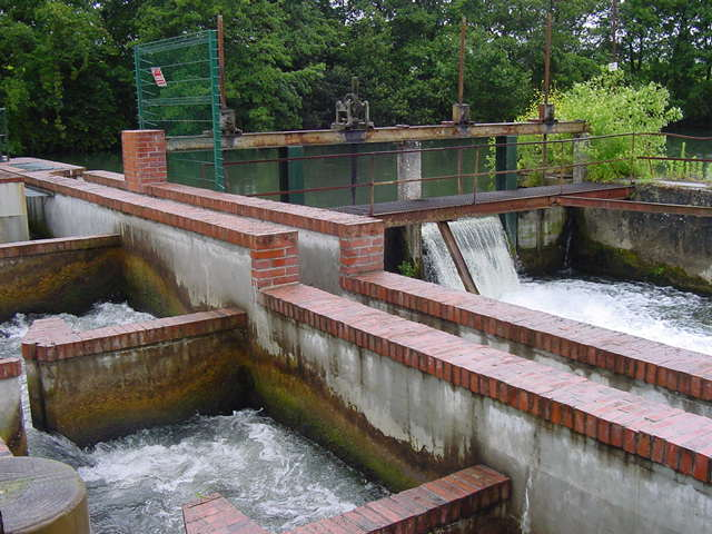 Une passe à poissons sur la Touques (rivière) au Breuil-en-Auge (Calvados)